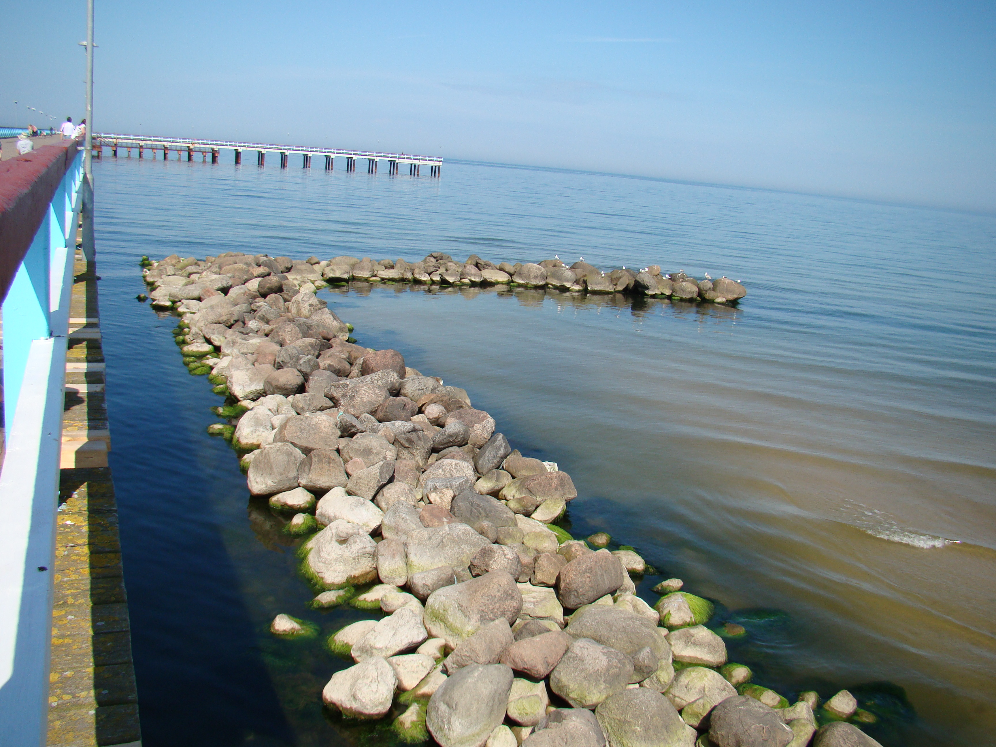 Palangos tiltas 2009 liepa